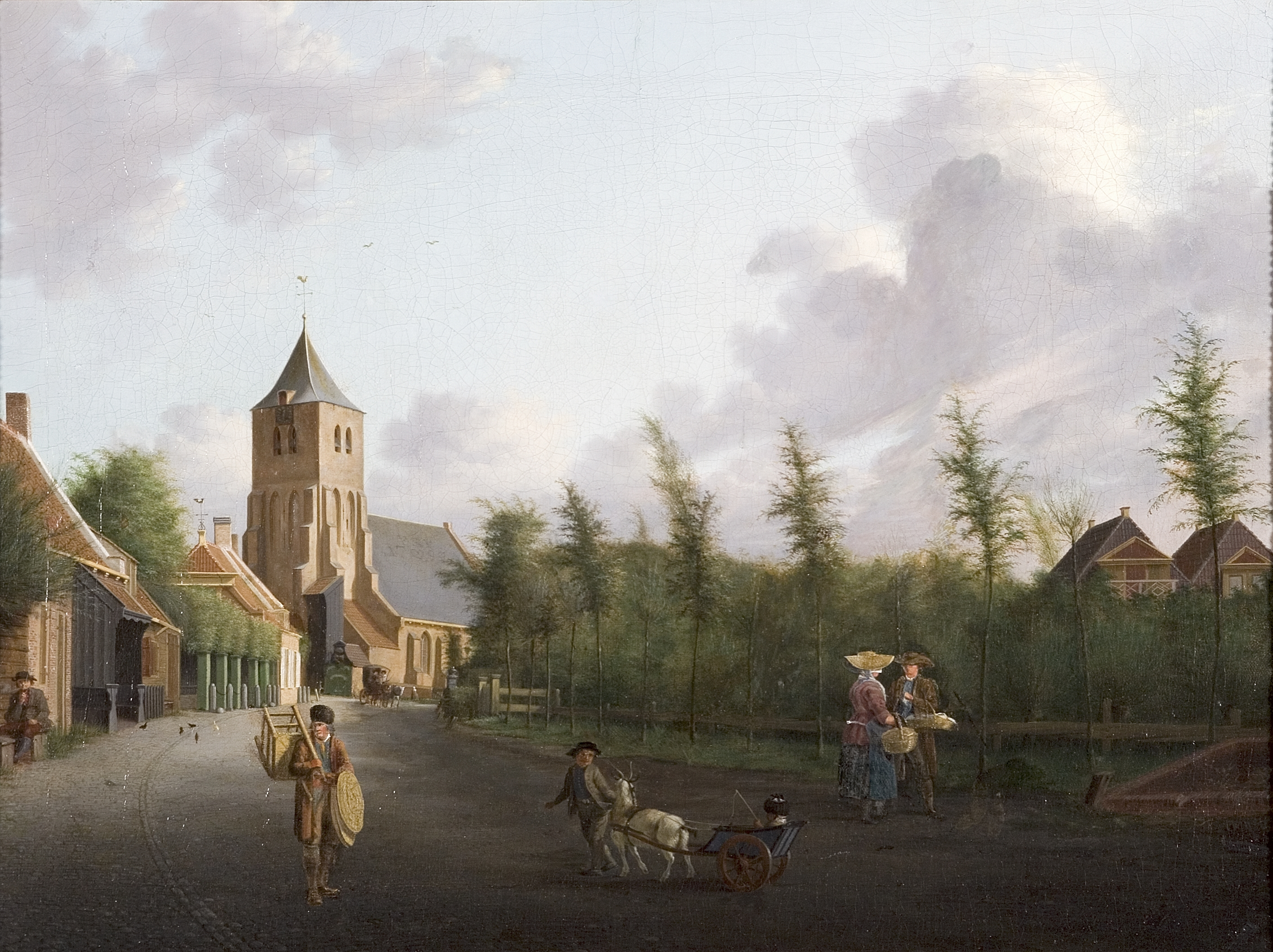 Gezicht op dorpsplein en kerk van Oost-Souburg, gezien vanuit het zuidwesten, 1807